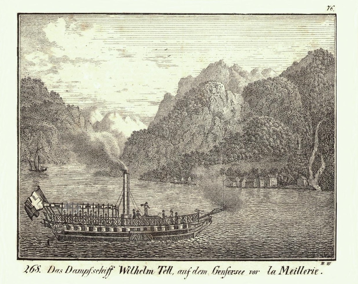 Gravure montrant le Guillaume Tell devant Meillerie. Collection "JCD".